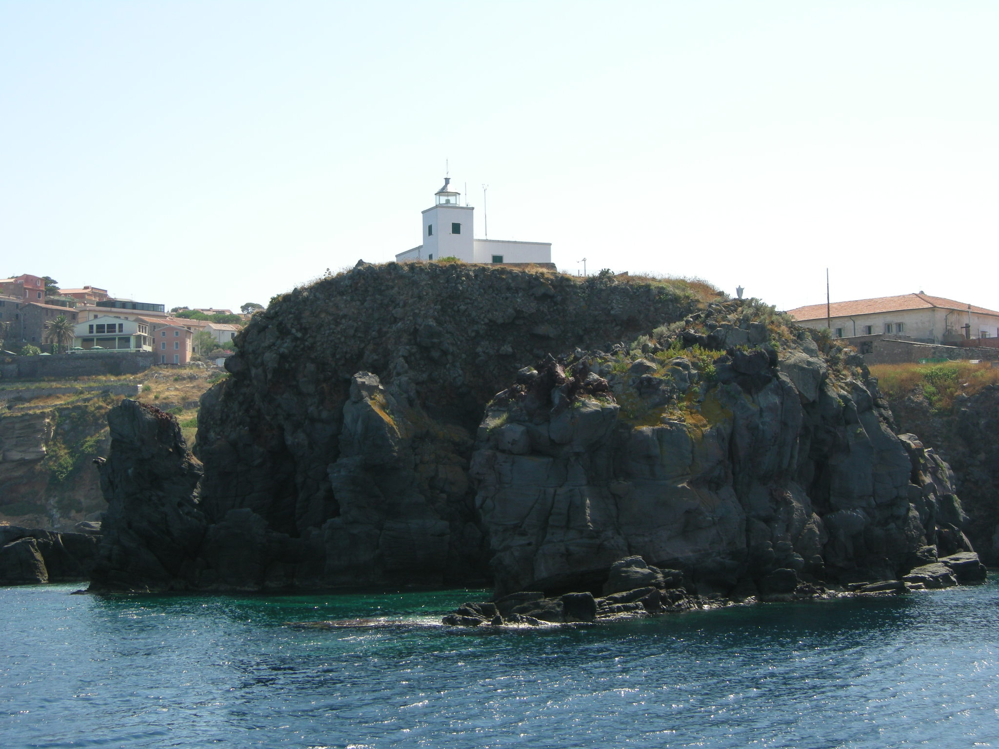 Capraia, giro periplo 05 punta del ferraione (faro)